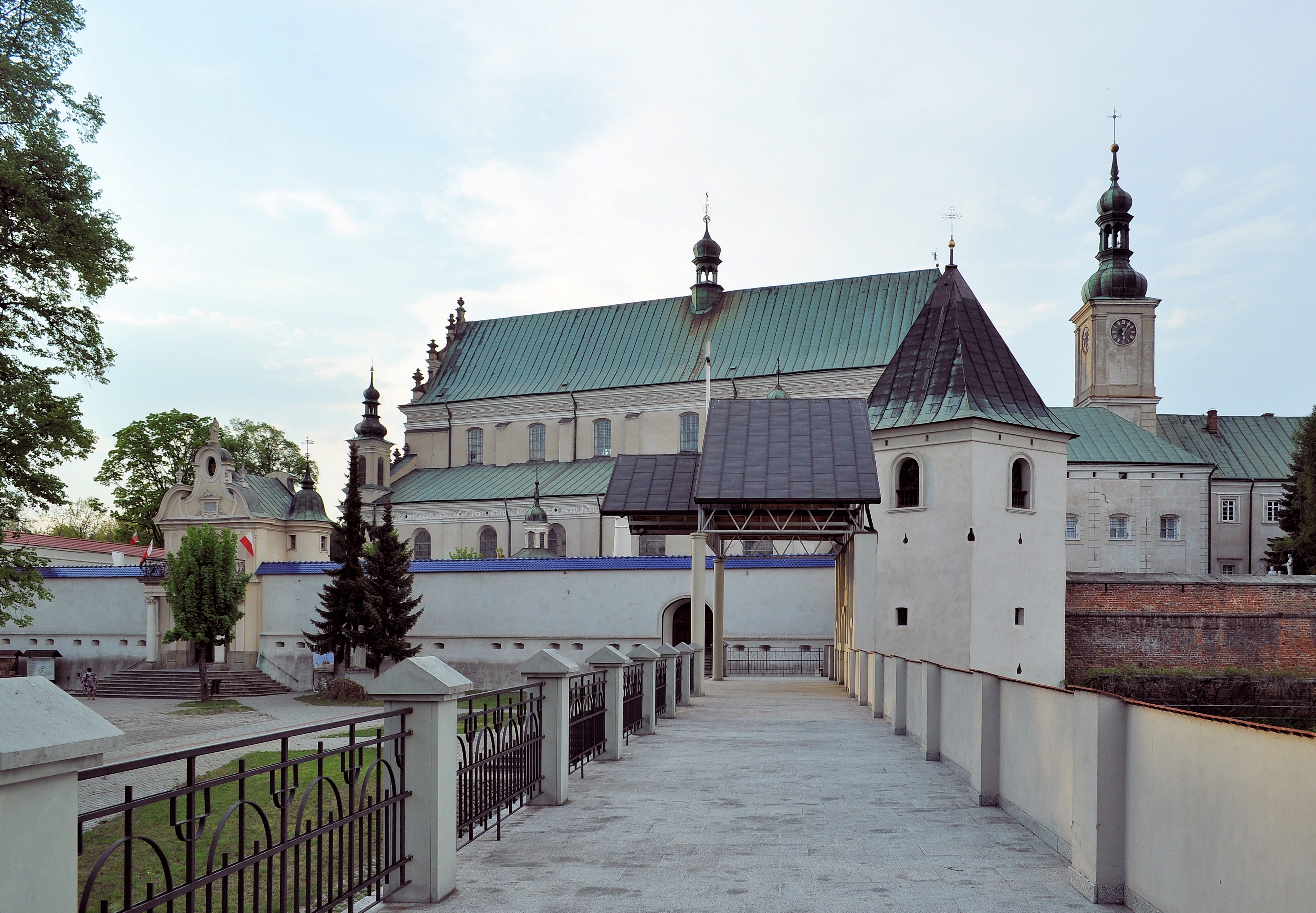 Klasztor bernardynów w Leżajsku.